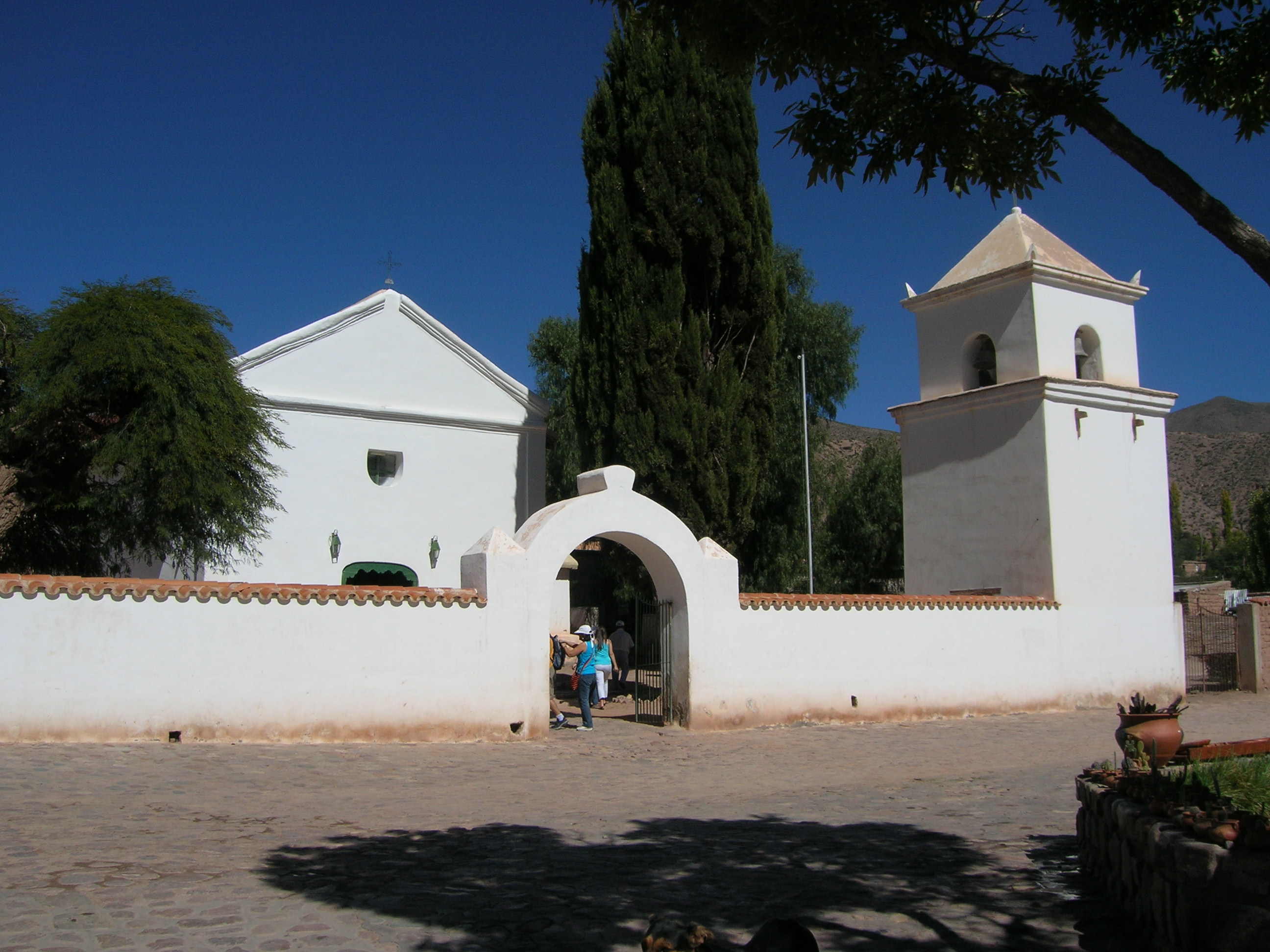 Iglesia de la Santa Cruz y de San Francisco de Paula. Uquia. Provincia de Jujuy. República Argentina.